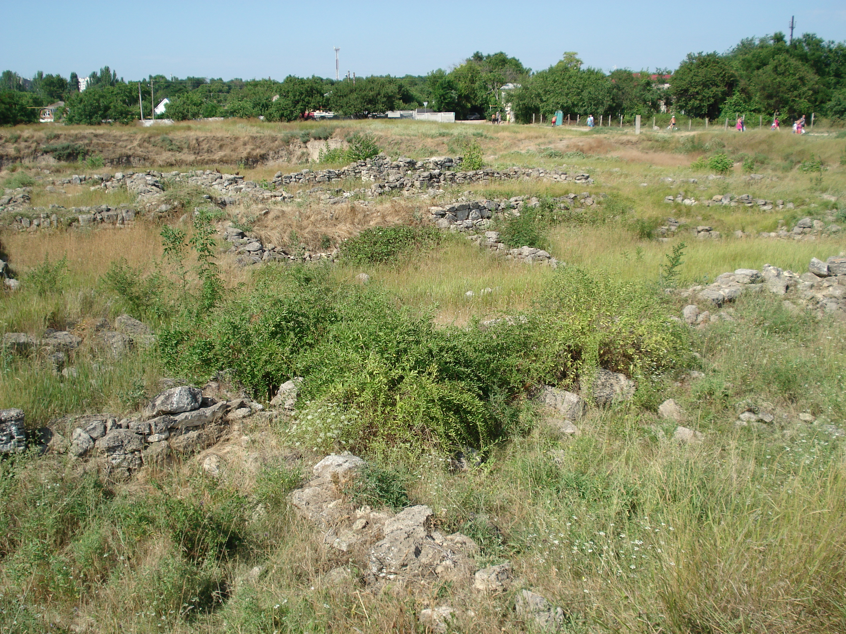 Археологічний комплекс «Стародавнє місто Мірмекій»